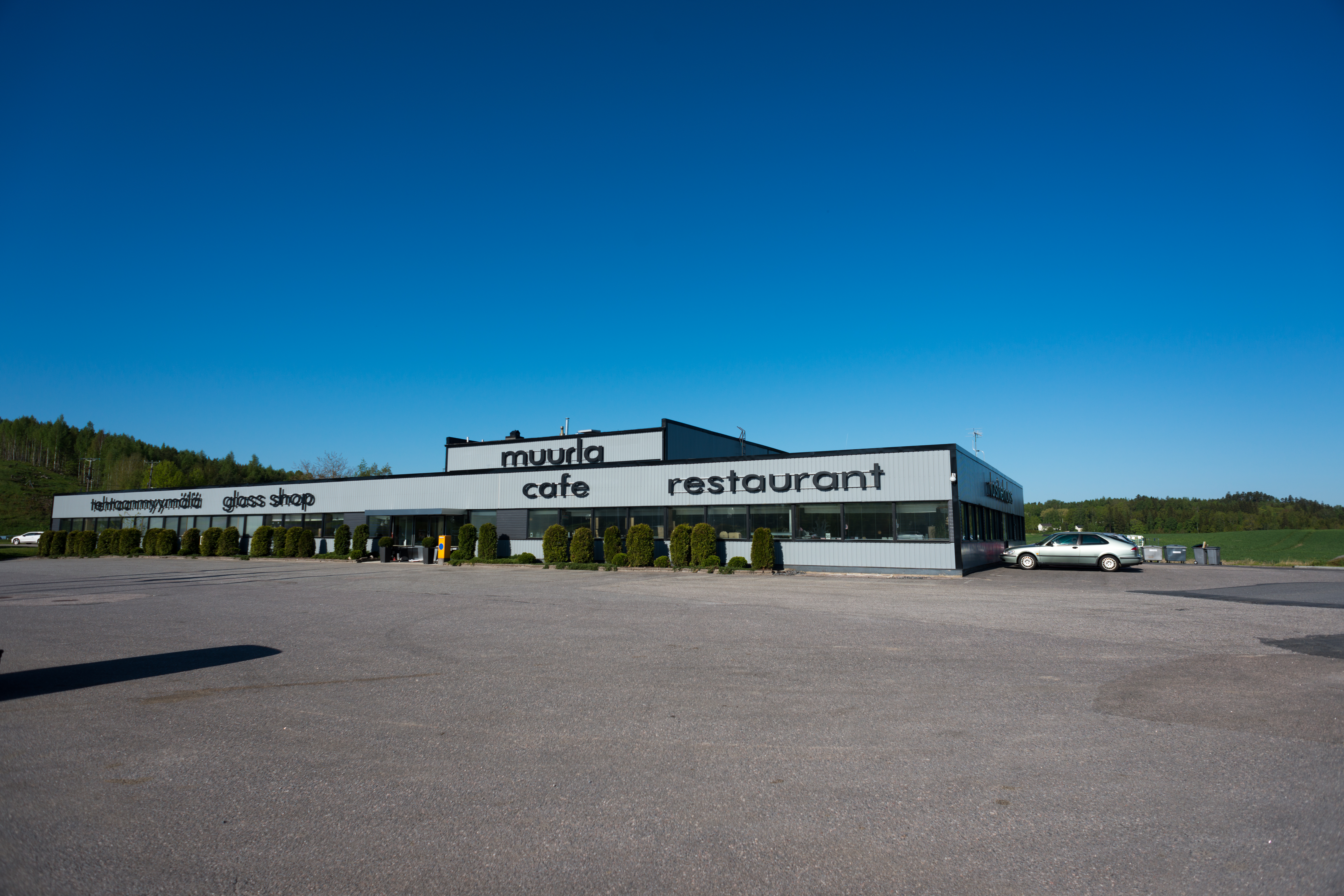 Muurlan lasi Muurlassa